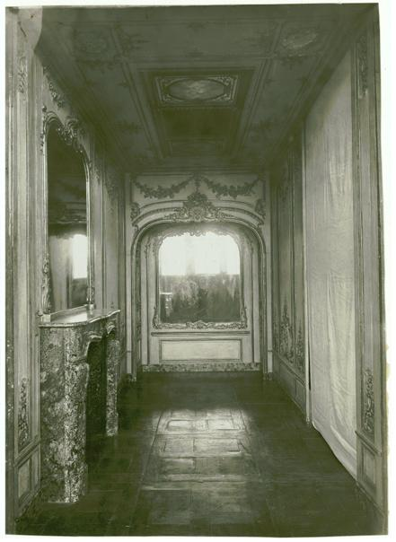 Photographie de la pièce, avec l'emplacement des boiseries replacées.